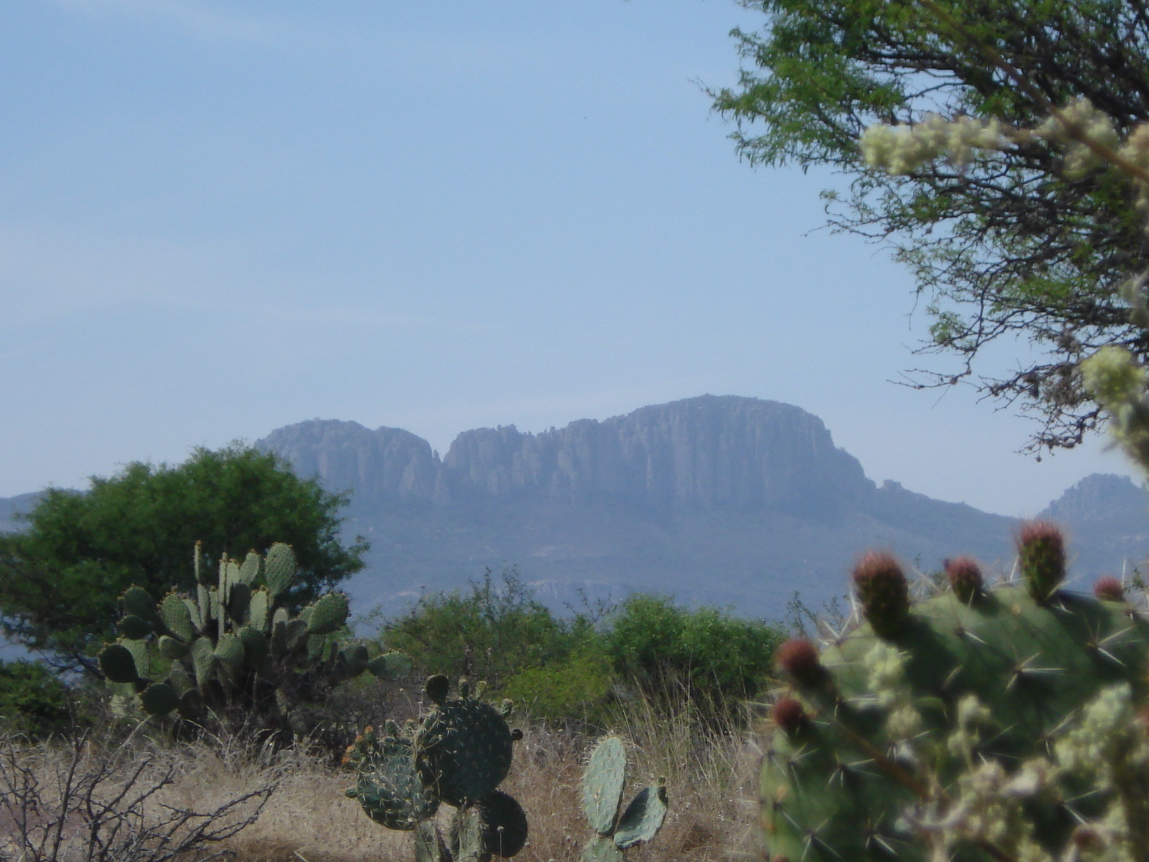 El Laurel